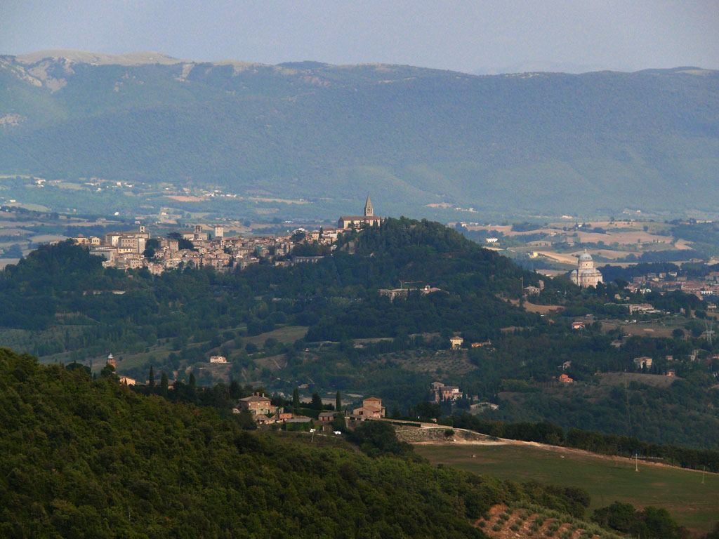 Todi: general view